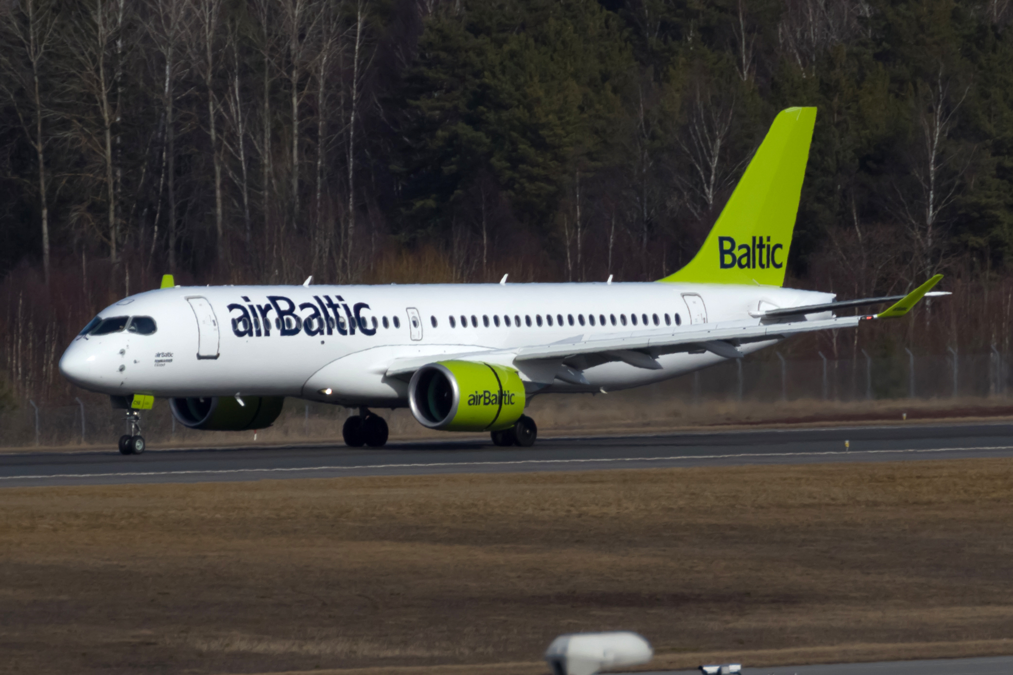 CS300 de airBaltic aterrando no aeroporto de Estocolmo-Arlanda.